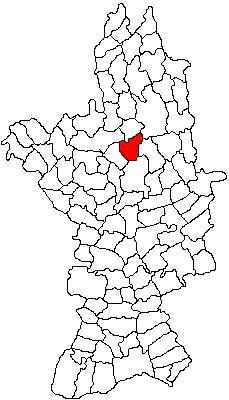 Categorie:Hărţi ale judeţului Olt